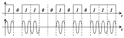 ASK OOK puhul